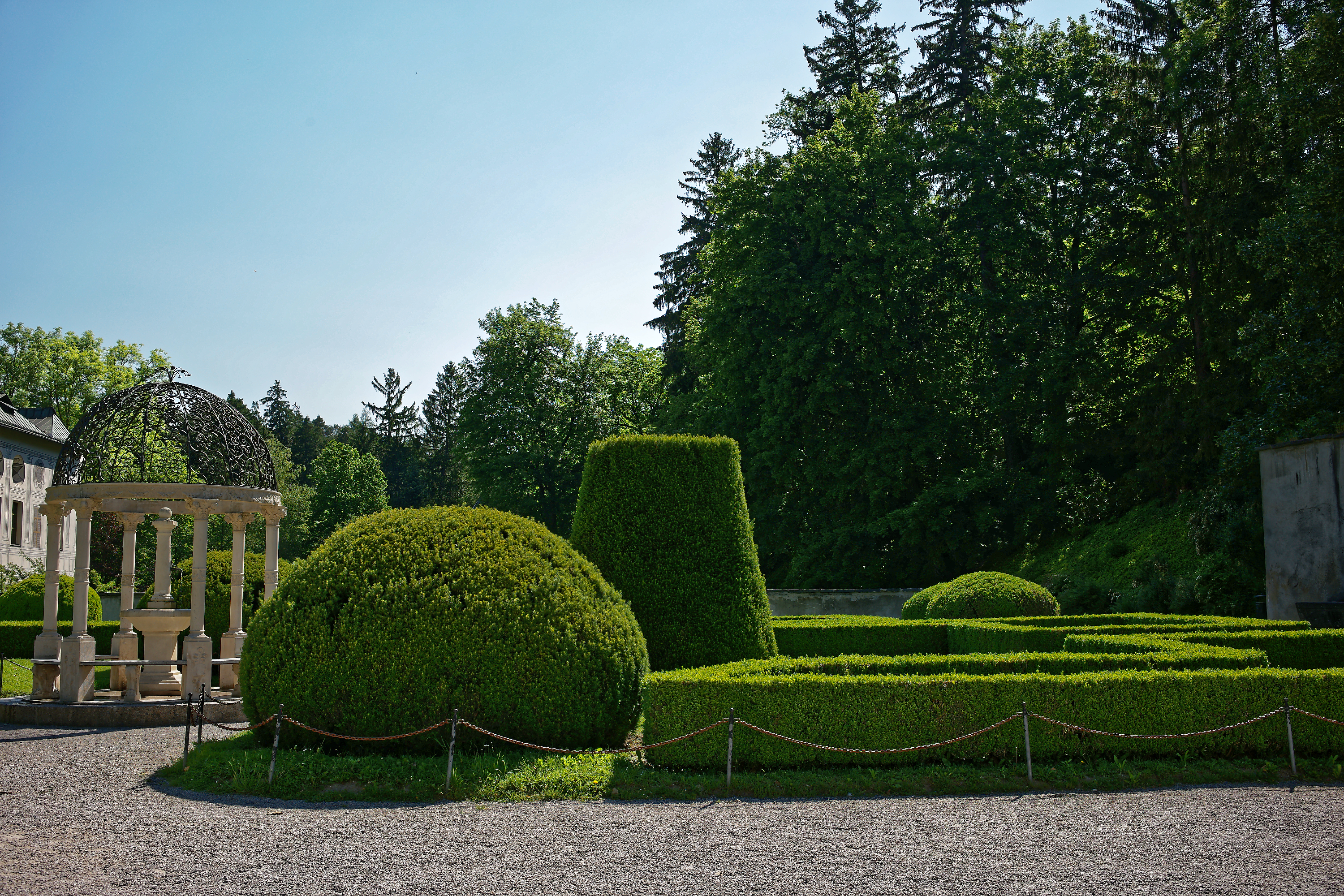 Schlossanlage und Garten von Ambras, aussen